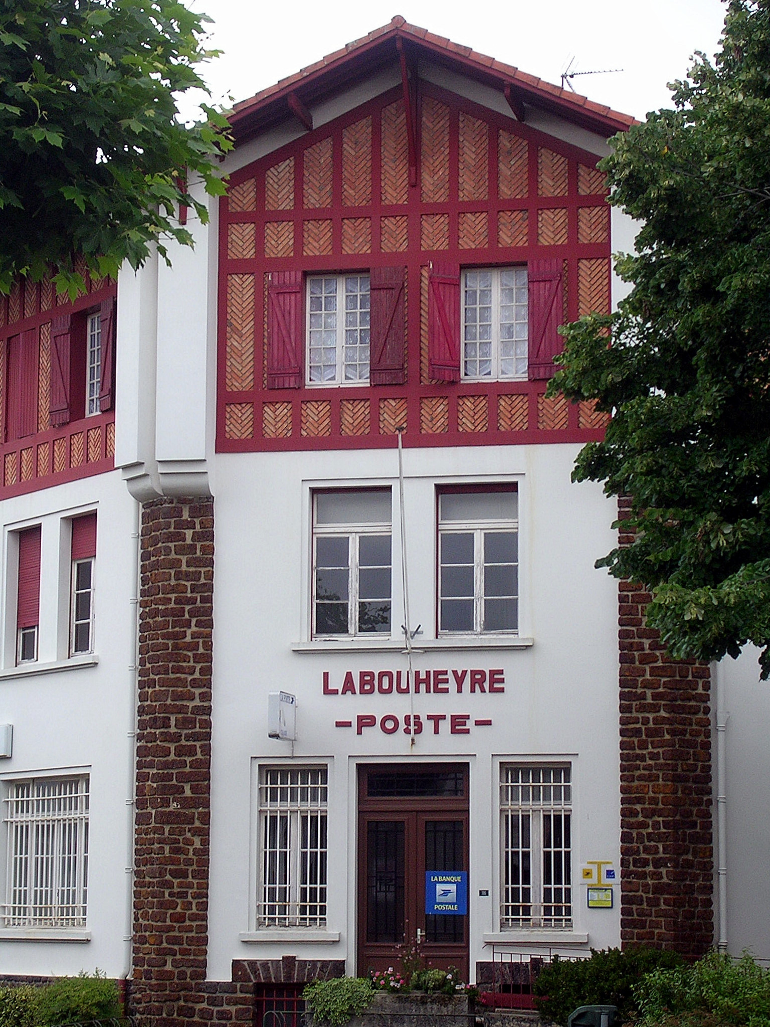 Bureau de poste de Labouheyre (Landes, France)